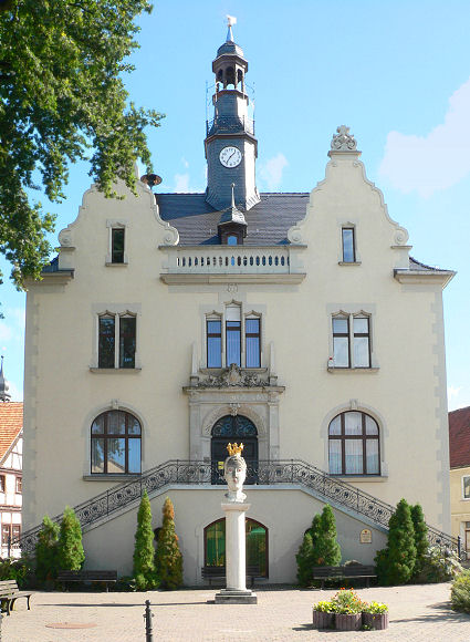 Rathaus Möckern Foto aufgenommen von Benutzer Benutzer:Axel Hindemith, September 2005